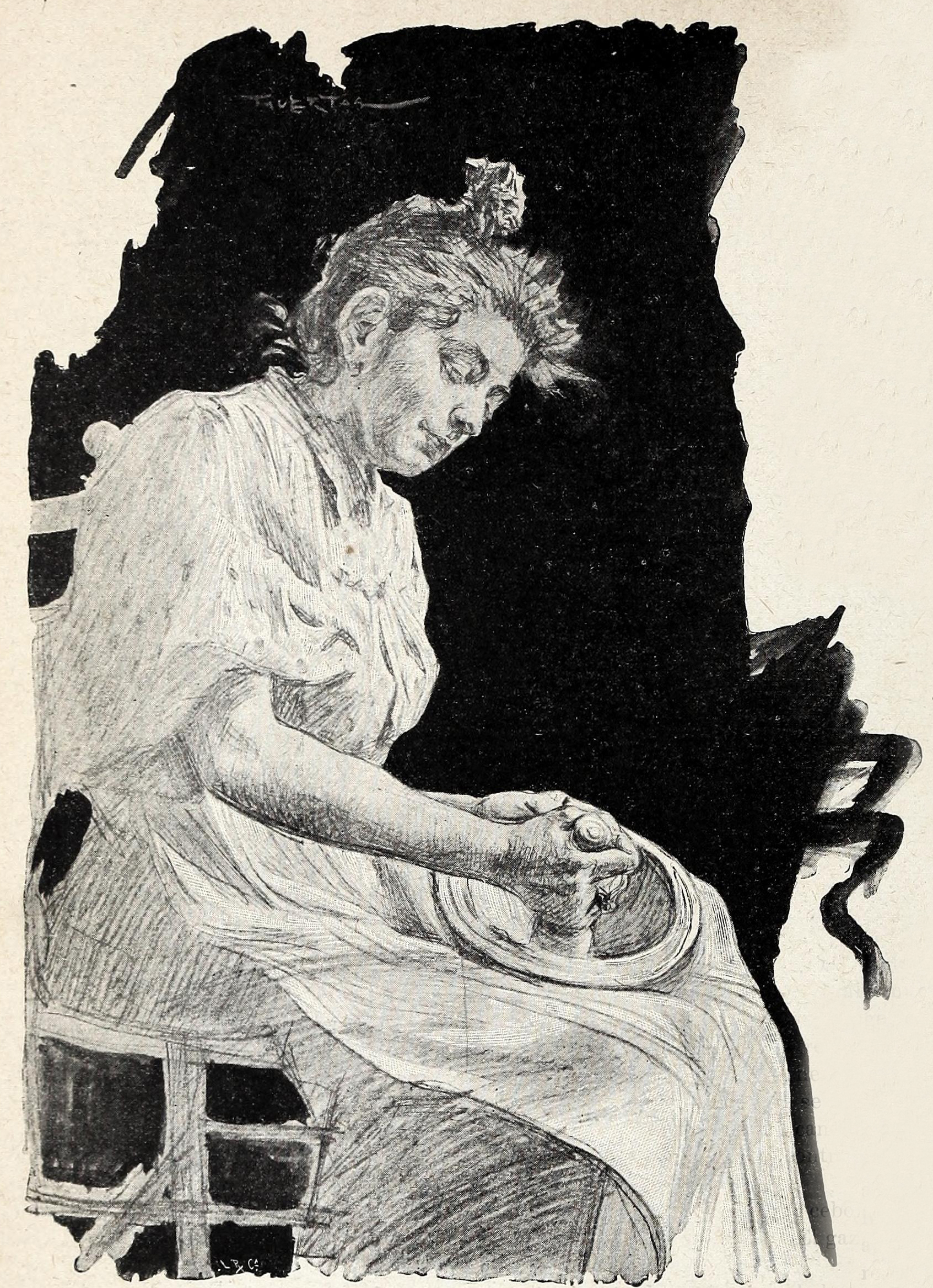 Cosas de verano VI. El gazpacho.